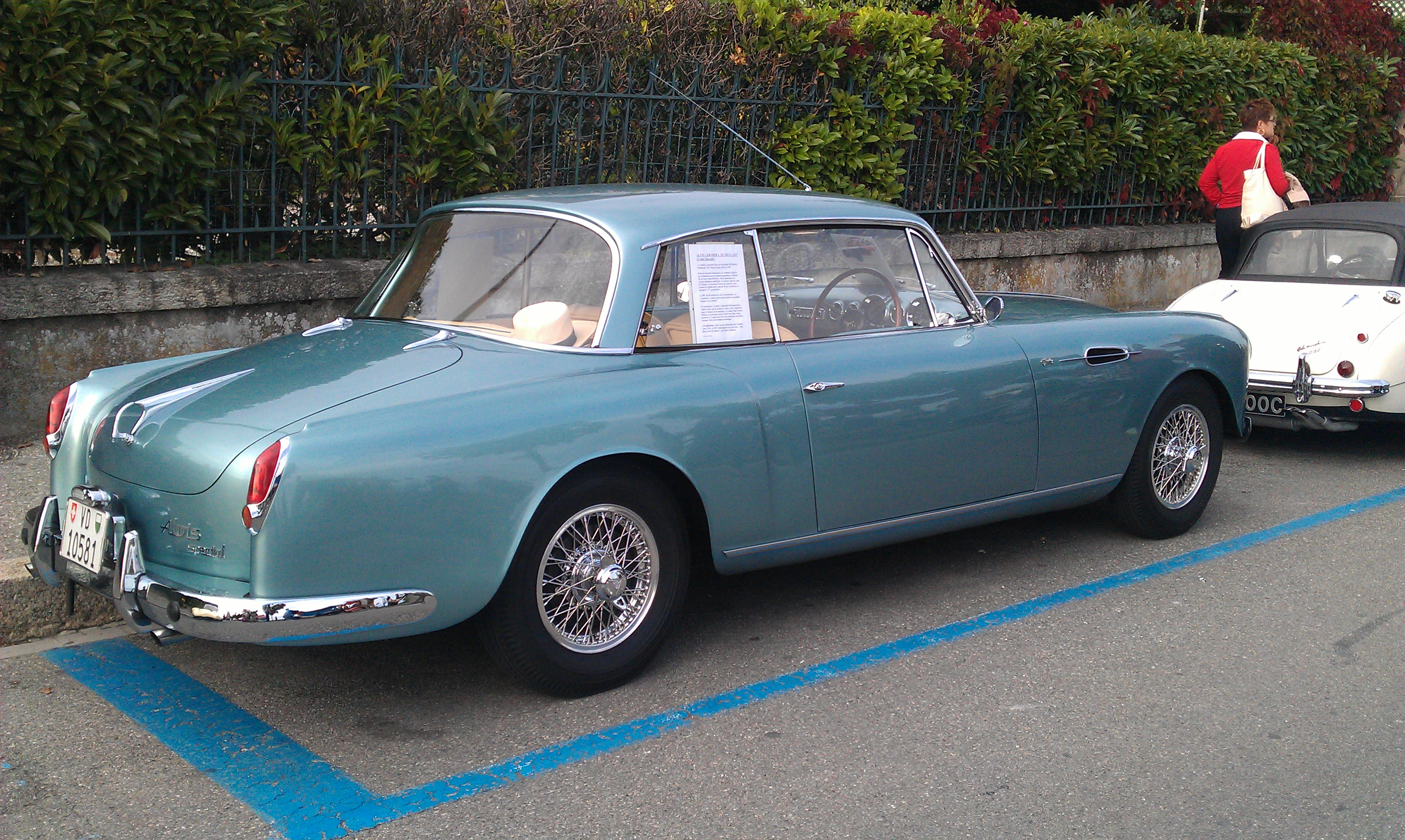 Alvis «Graber» TC 108 G Coupé Special de 1957. 15 modèles ont été construits chez le carrossier Graber à Wichtrach, dans le canton de Berne, en Suisse, à partir de châssis et moteurs importés de chez Alvis, au Royaume-Uni. Les voitures étaient construites selon les désirs des clients, donc aucune n'est strictement identique aux autres. Ainsi, le relief au sommet des ailes avant est propre à ce modèle.